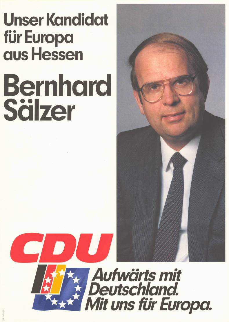 Unser Kandidat für Europa aus Hessen Bernhard Sälzer CDU Aufwärts mit Deutschland. Mit uns für Europa. Abbildung: Porträtfoto Plakatart: Kandidaten-/Personenplakat mit Porträt Objekt-Signatur: 10-030 : 152 Bestand: Europawahlplakate (10-030) GliederungBestand10-18: Europawahlplakate (10-030) » Europawahl am 17.6.1984 » CDU Lizenz: KAS/ACDP 10-030 : 152 CC-BY-SA 3.0 DE